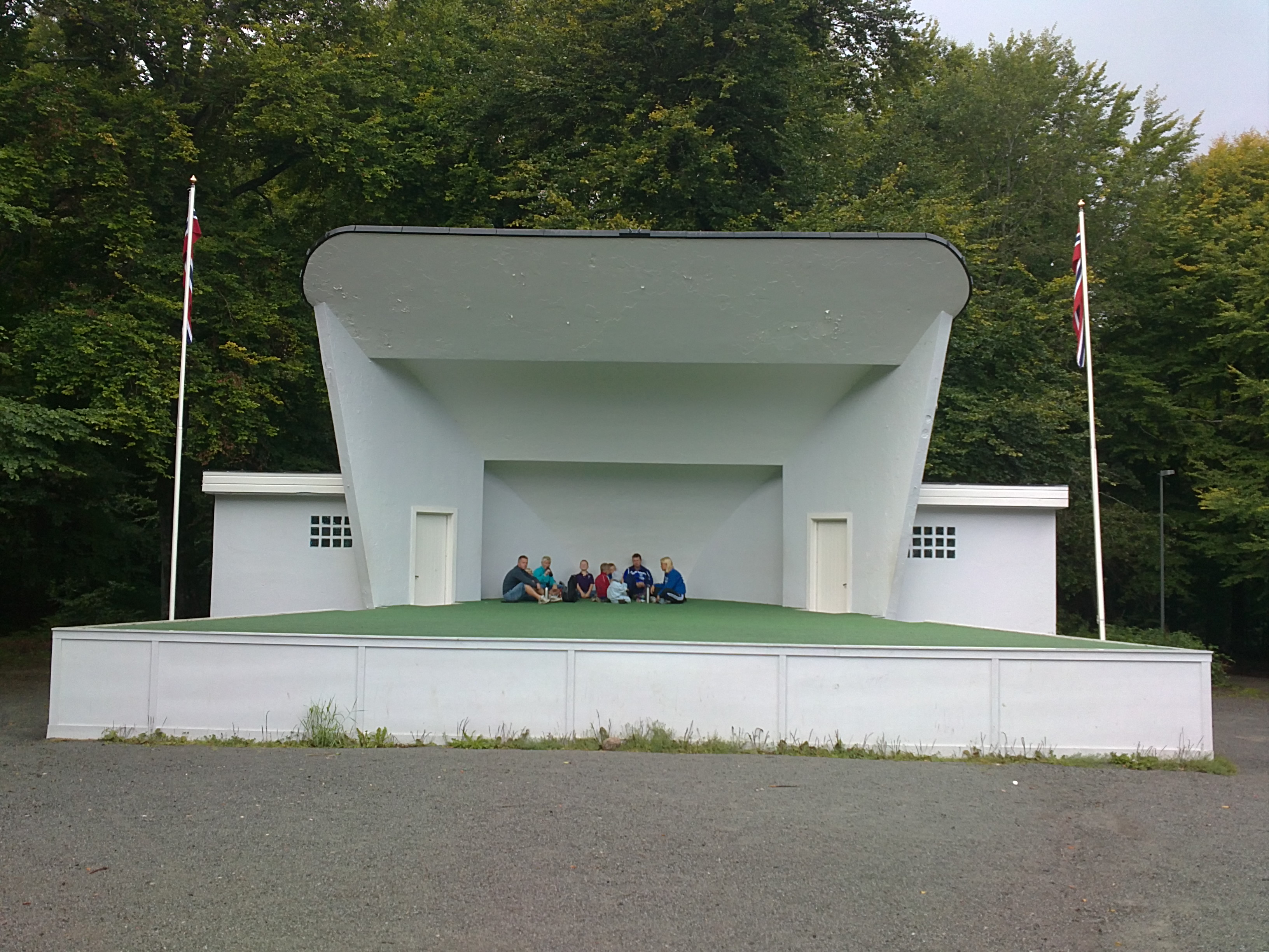 Bilde av Paviljongen i Bøkeskogen